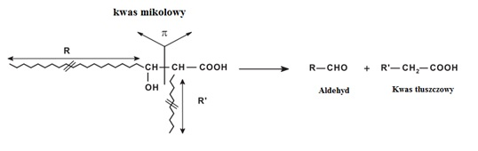 Ogólny schemat budowy kwasu mikolowego oraz przedstawienie reakcji odszczepienia π, w wyniku którego powstaje aldehyd i kwas tłuszczowy; R i R’ oznaczają długie łańcuchy węglowodorowe.